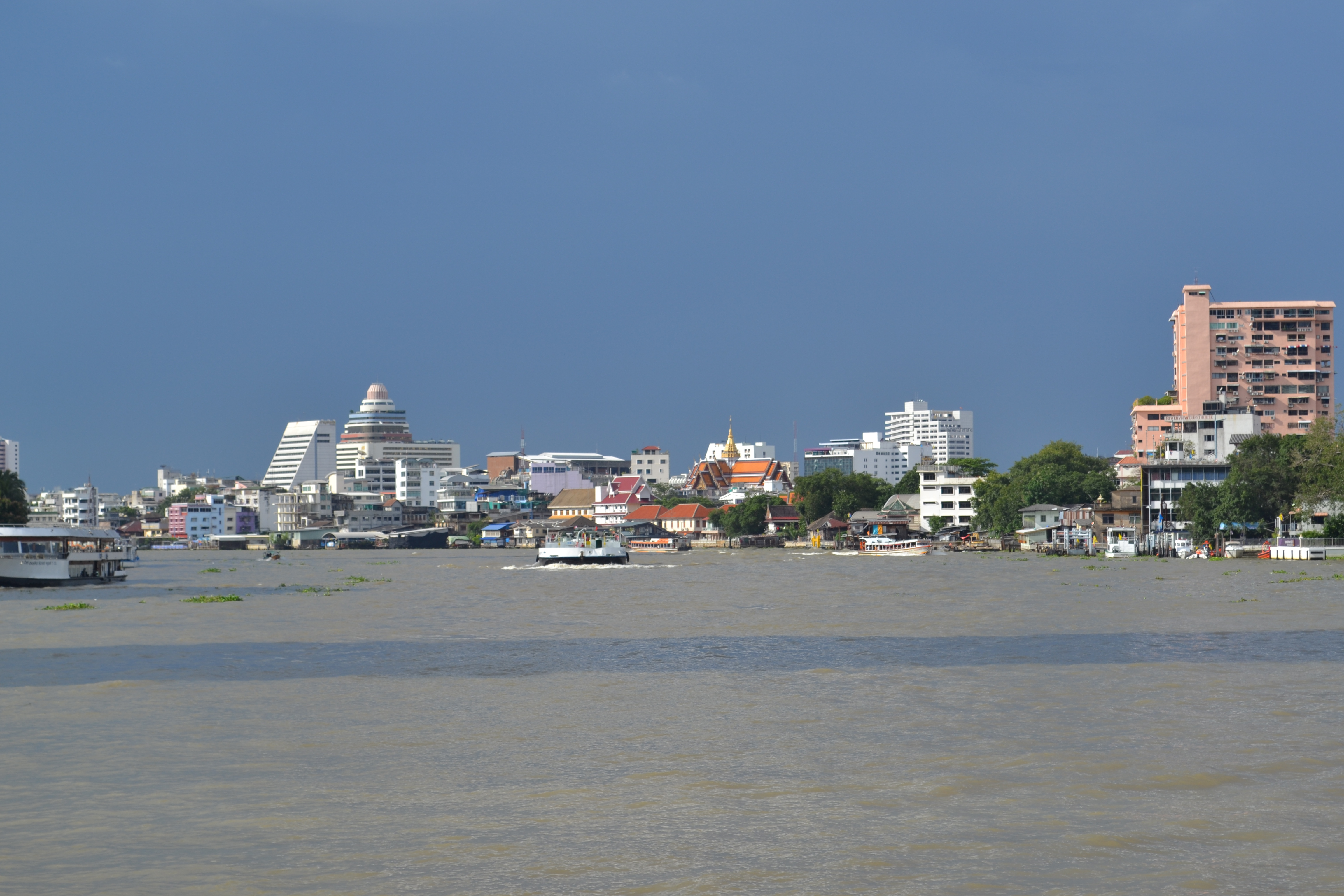 Chao Phraya